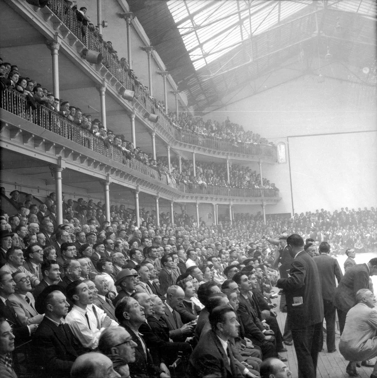 Eibarko Astelena pilotalekua partida garrantzitsuetan zehar. Gipuzkoa, Euskal Herria.